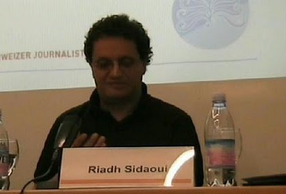 Riadh Sidaoui lors d'un colloque international tenu à Lugano en mars 2007